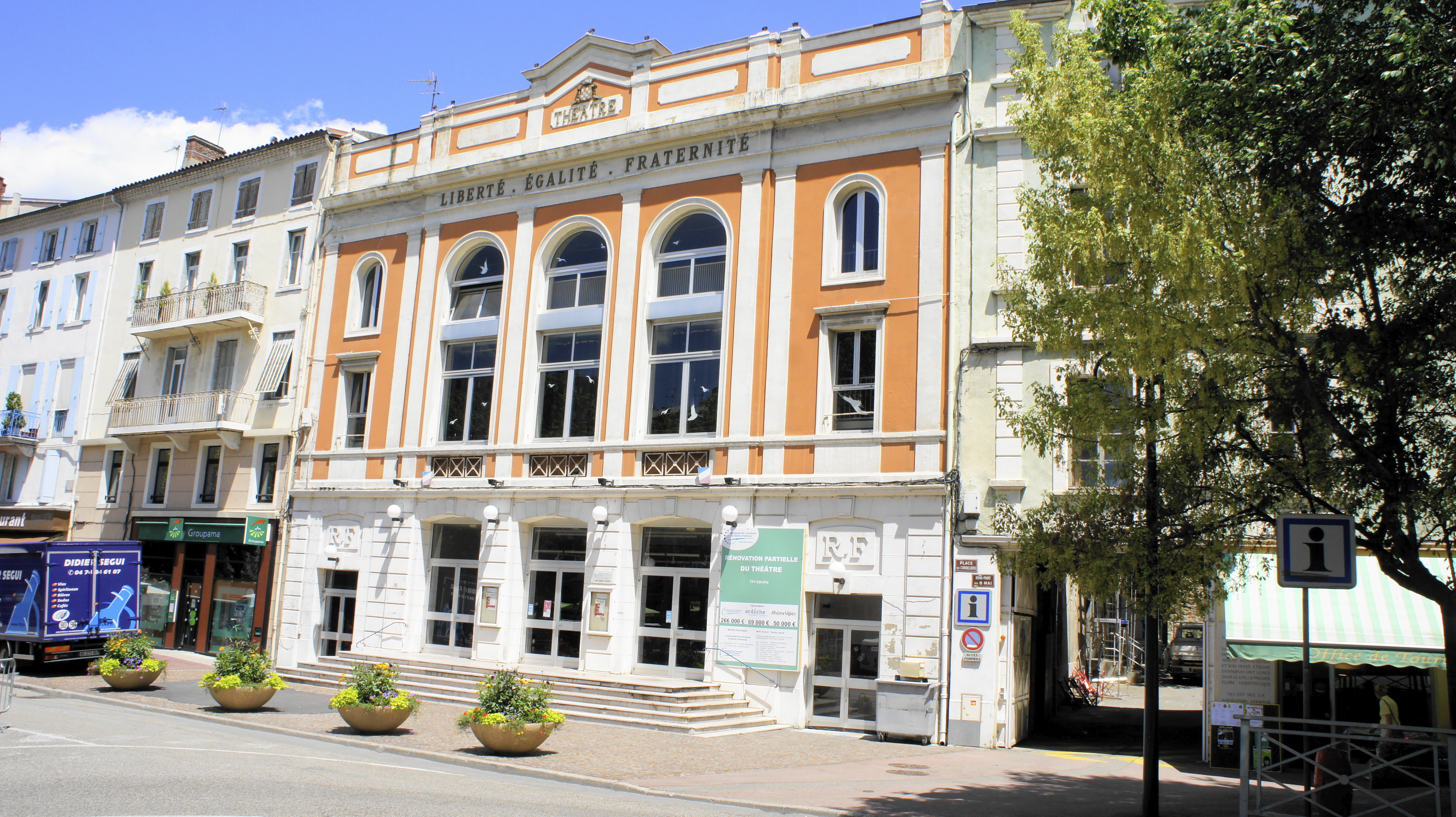 Façade du théatre municipal d'Annonay